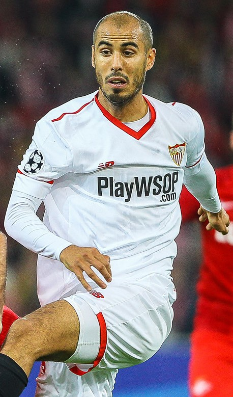 Guido Pizarro